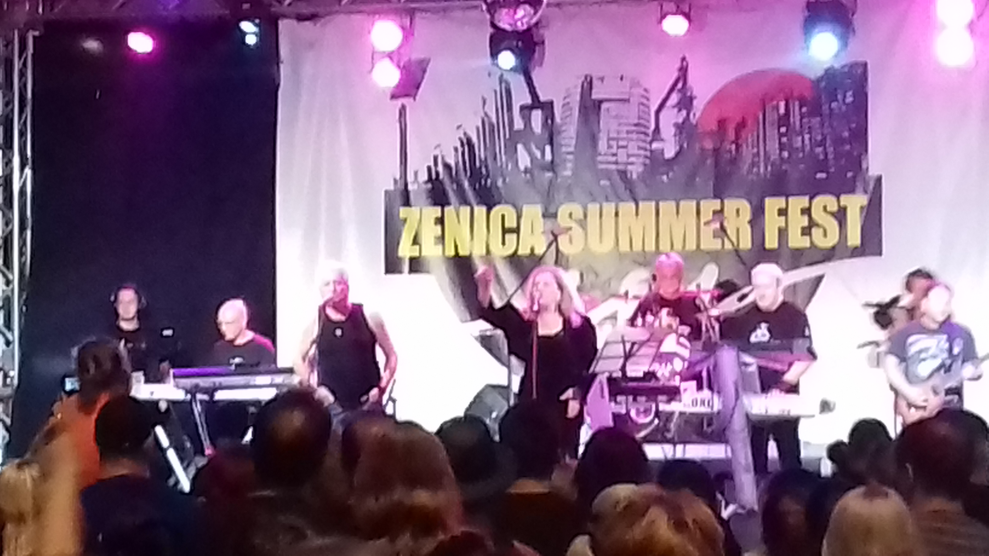 Nusreta Kobić, Svjetski a naši, 15. noć Zenica summer festa